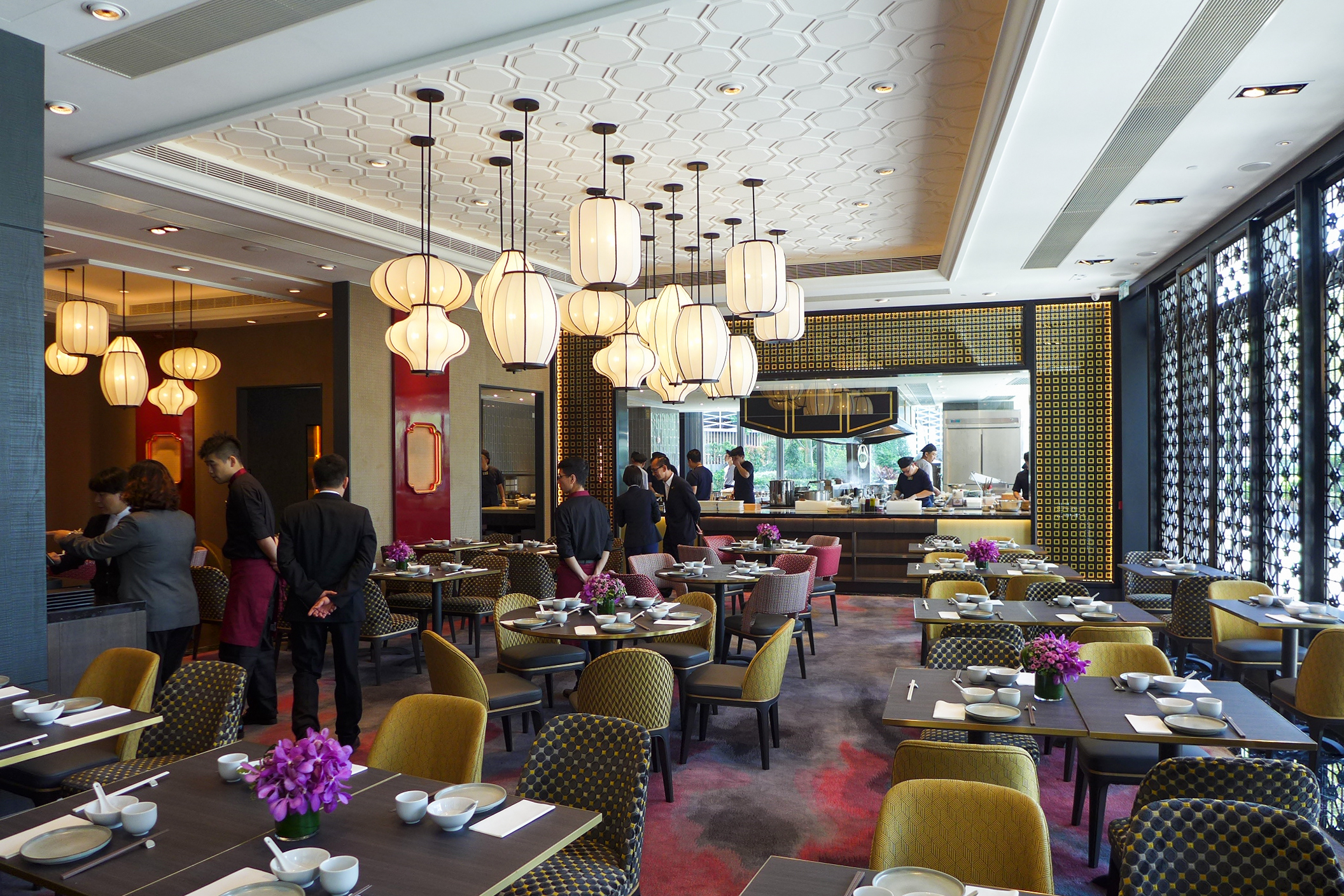 YOHO Mall Peking Garden Interior